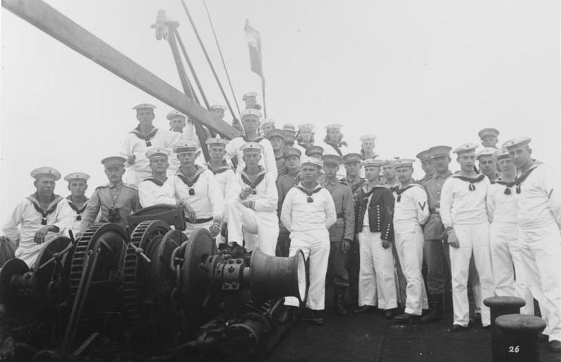 China, Tsingtau China, Tsingtau [Gruppenbild von Matrosen auf einem Schiff] Fotoalbum: Bilder aus China, von Ob.Matr.Artl. Quinten [Fotoalbum: Bilder aus China, von Ob.Matr.Artl. Quinten; Bem.: Originaltitel z.T. inkorrekt]